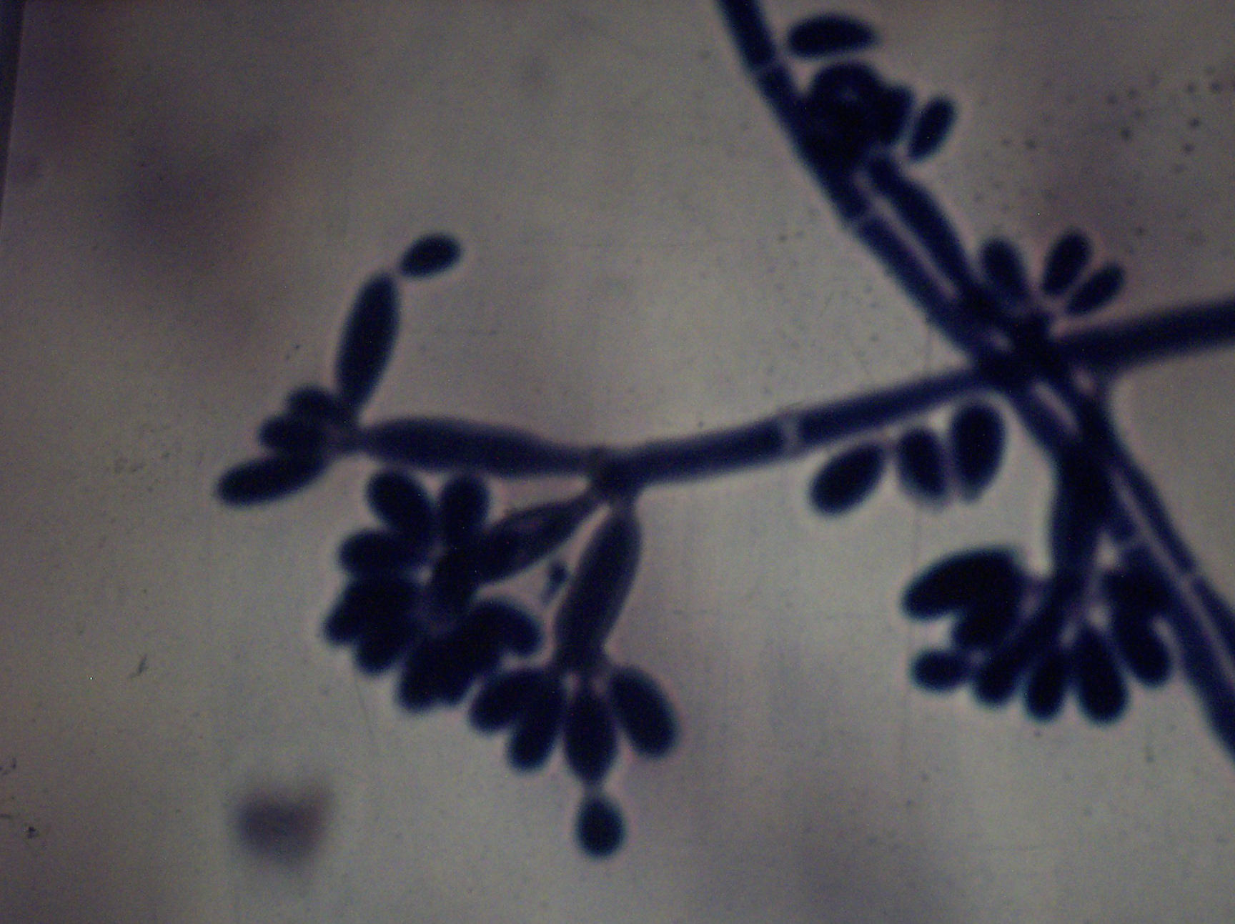 Conidia de la especie de hongo Fonsecaea pedrosoi